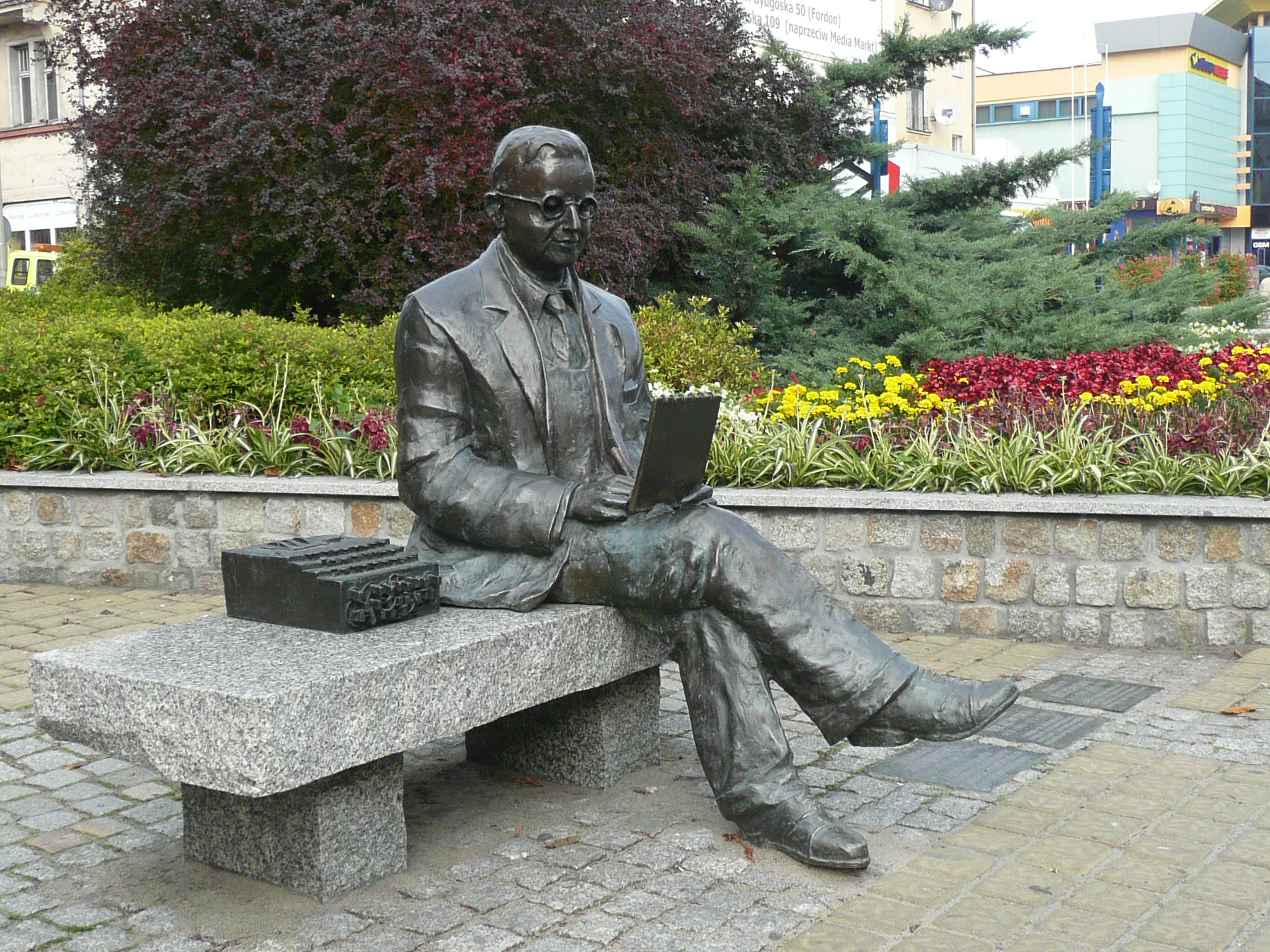 Bydgoszcz, ulica Gdańska